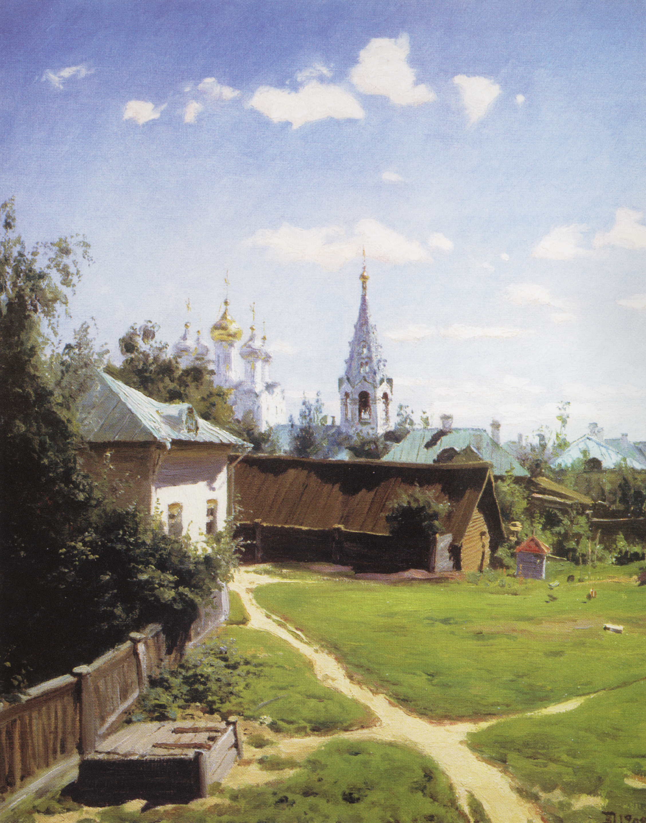 Вариант картины, исполненной в 1878 г.